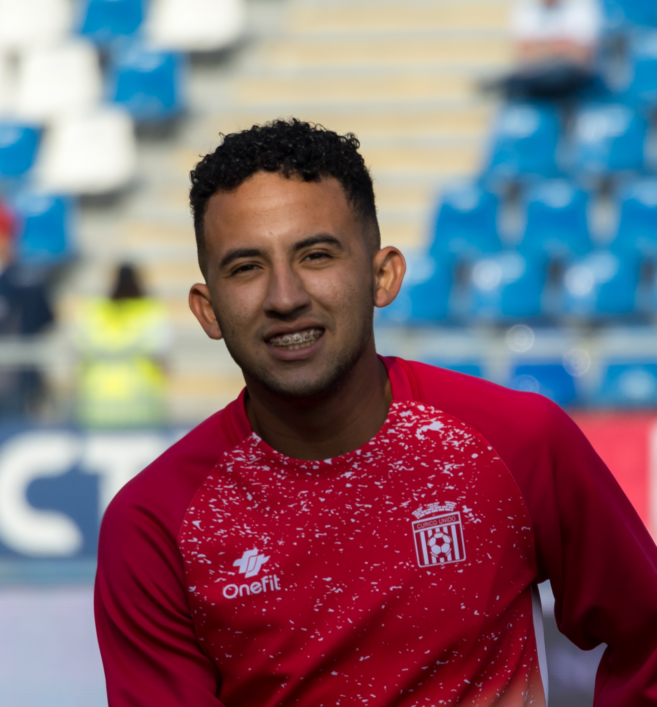 Héber García, Universidad Católica v Curicó Unido, Estadio San Carlos de Apoquindo, Las Condes, Santiago, Región Metropolitana, Chile.